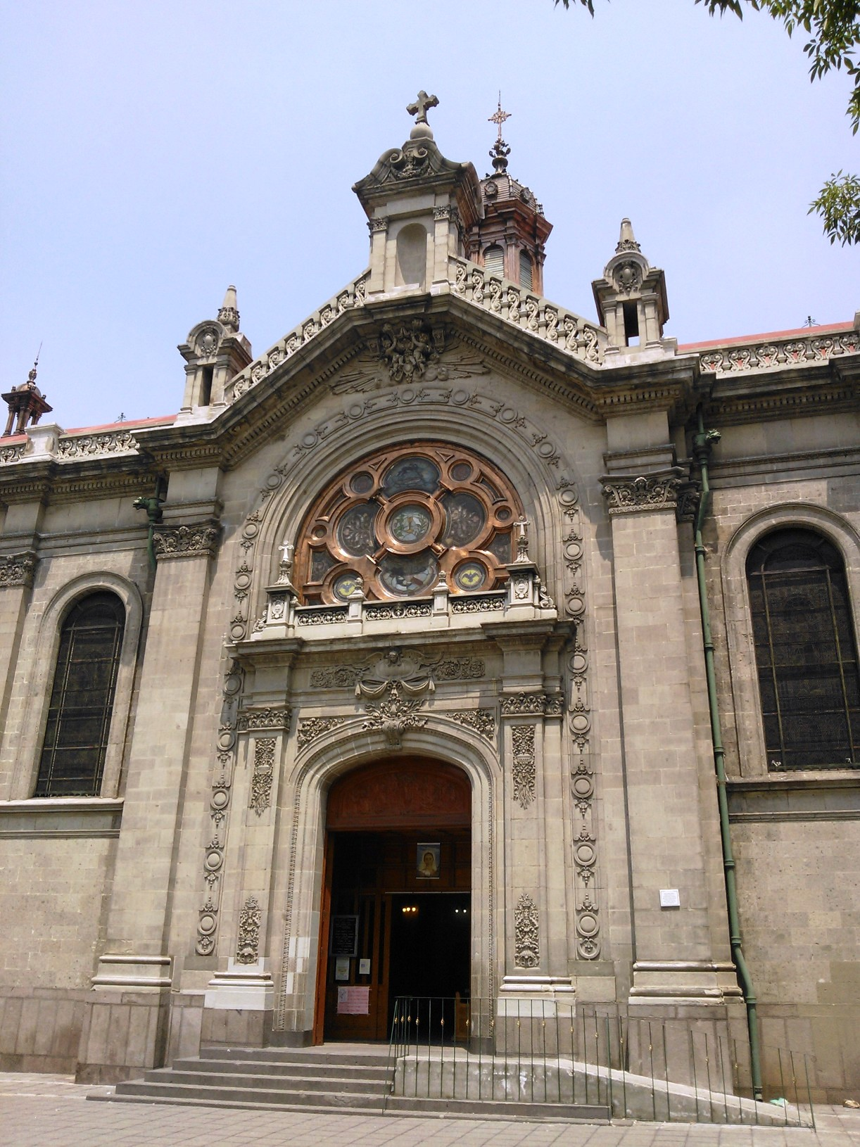 Iglesia del Buen Tono en el centro histórico de la Ciudad de México